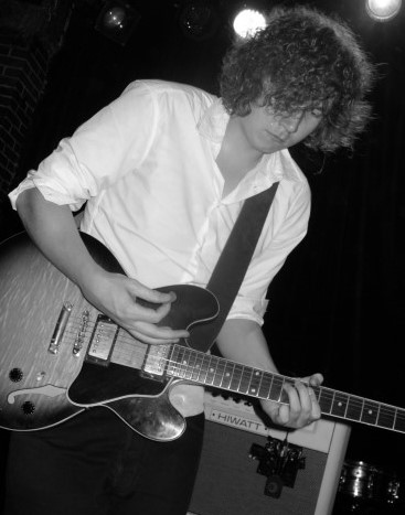 Hugh Harris - Guitariste de The Kooks 14 juin 2006 à la Maroquinerie (Paris) photo de Sandra CARPENTIER